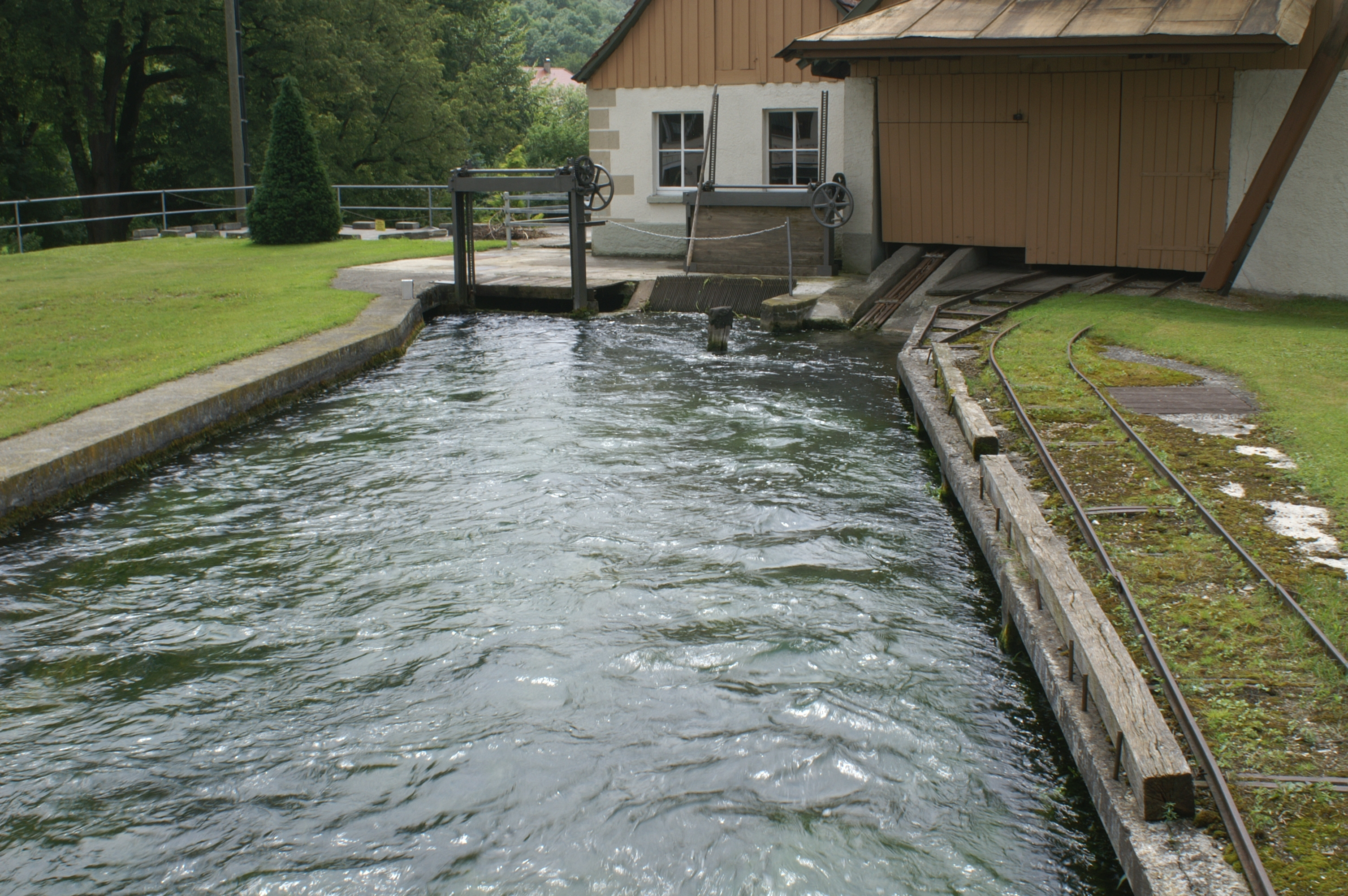 Die Zwiefalter Ach beim Elektrizitätswerk in Zwiefaltendorf, kurz vor der Mündung in die Donau